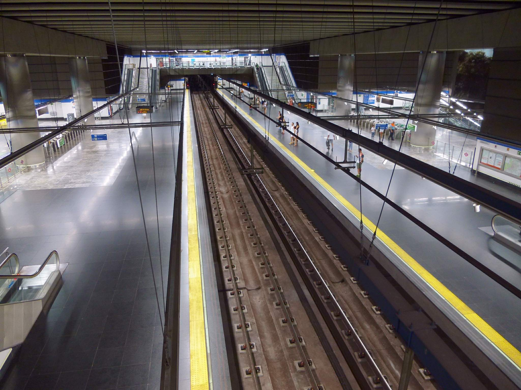 Estación de Puerta del Sur (Alcorcón)